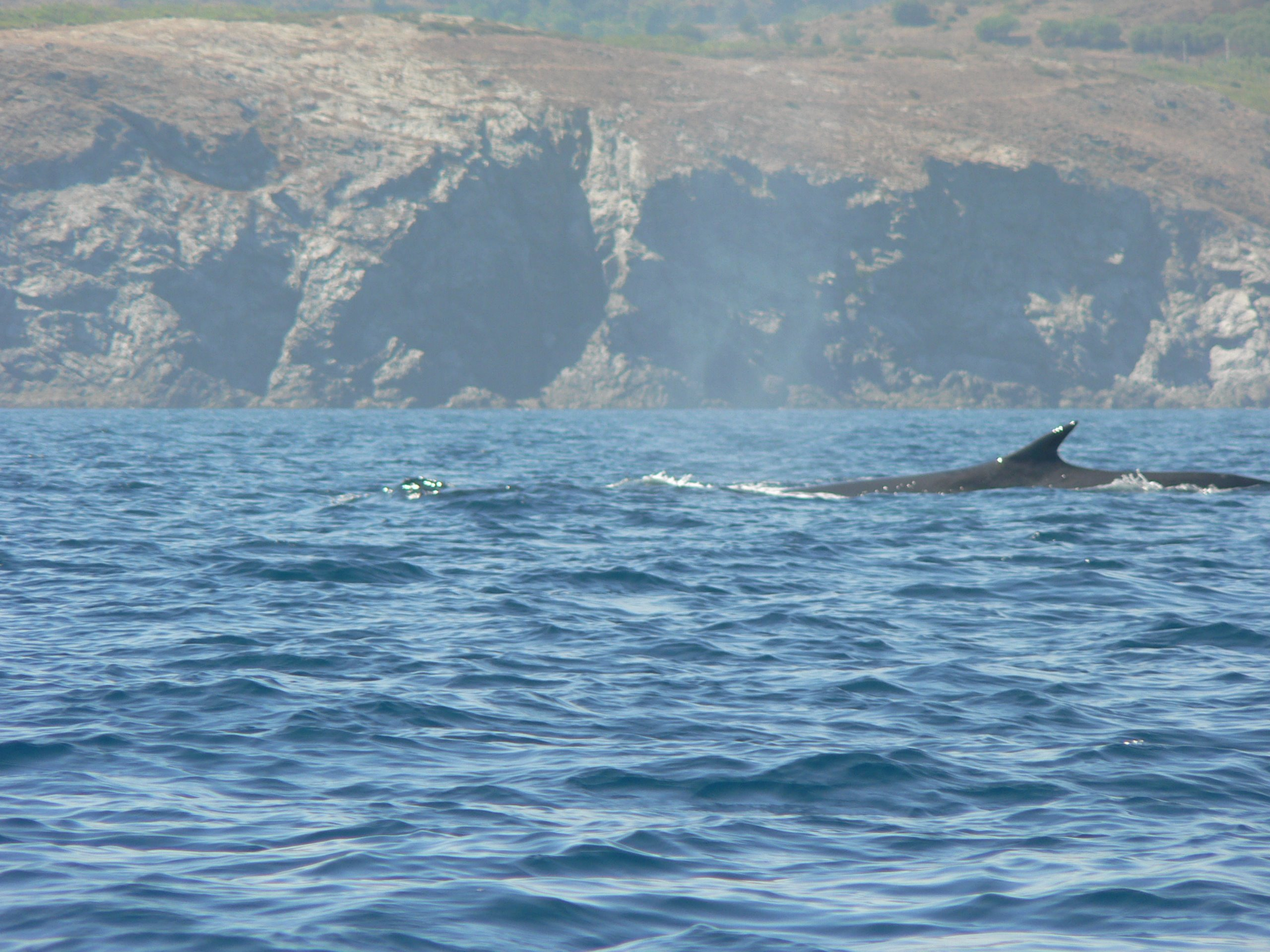 Rorqual commun prés du cap Béar (France)